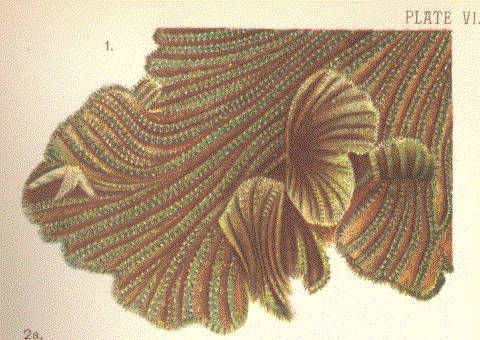 Ilustración de Merulina ampliata (regalis) de Dana, James D. 1890. Corals and Coral Islands. New York : Dodd, Mead and Company; Plate VI